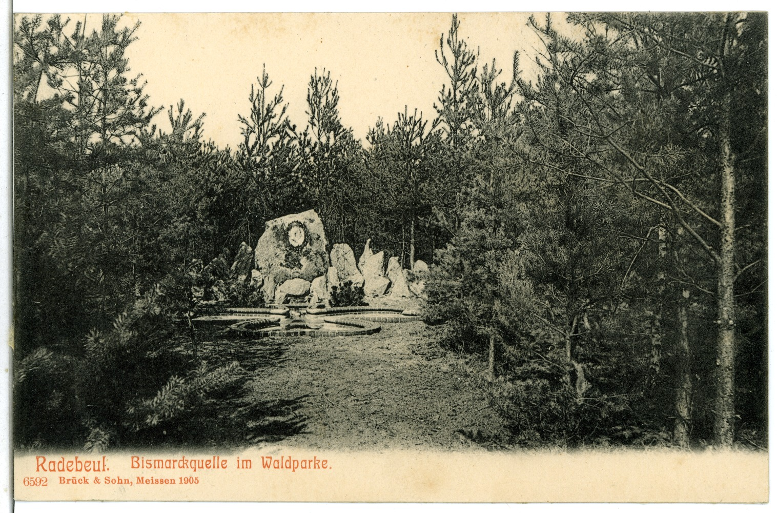 Radebeul; Bismarckquelle im Waldpark This postcard is from publisher Brück & Sohn in Meißen ( postcard has a unique number 06592 and is available in a higher resolution at the publisher. This images was uploaded in a cooperation project between Wikipedians and the publisher.